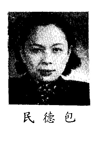 中文（中国大陆）: 制憲國民大會代表